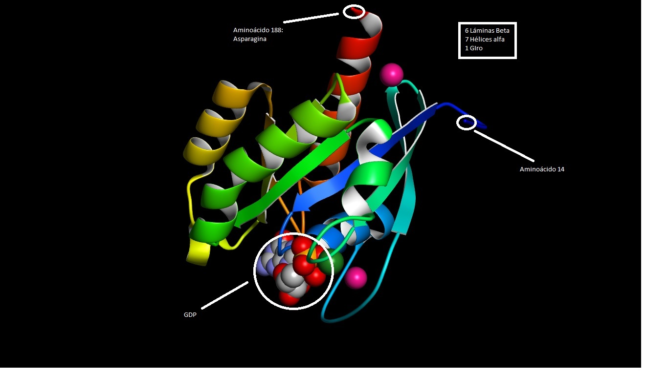 Estructura tridimensional de la Rab3D, formada por 7 hélices alfa y 6 láminas beta